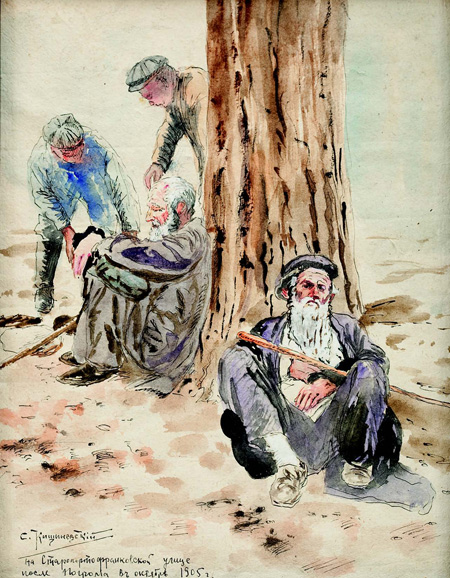 На Старопортофранковской улице после погрома